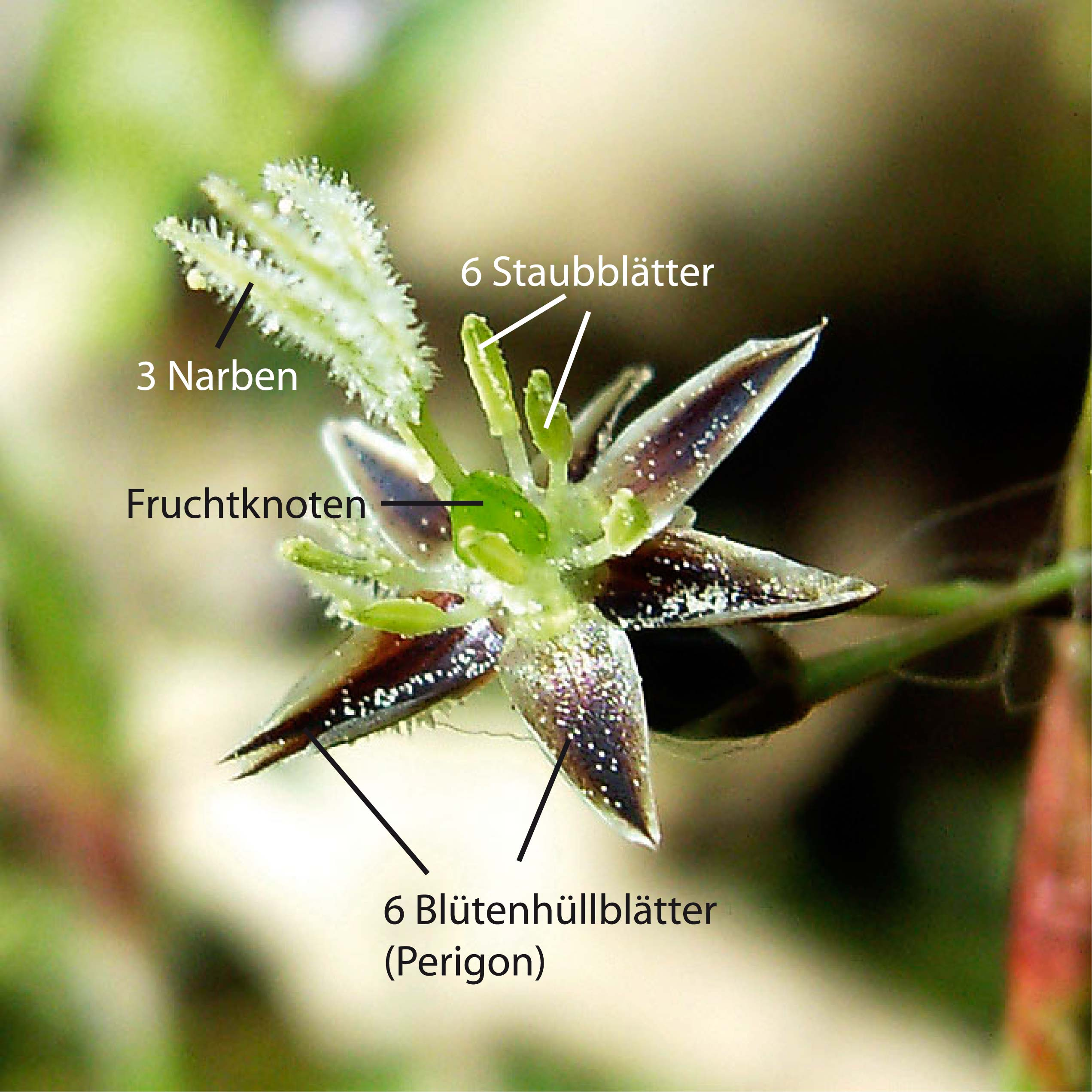 Bluete einer Hainsimse (Luzula), flower of Luzula